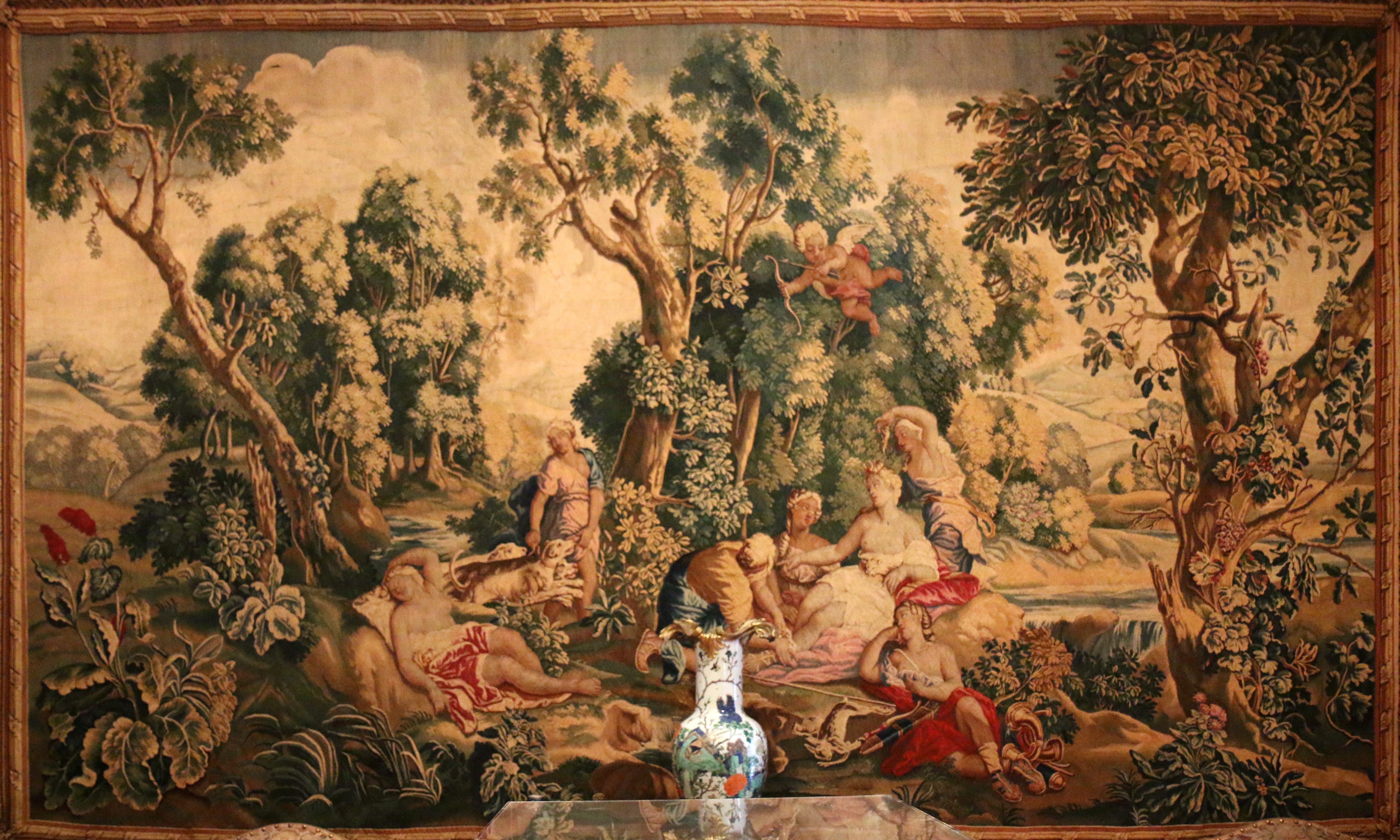 Tapisserie des Gobelins du XVIIIe siècle représentant le retour de chasse de Diane d'après les cartons de Charles de La Fosse (1636-1716). Laine et soie, 7 fils au cm, signature en bas à droite.